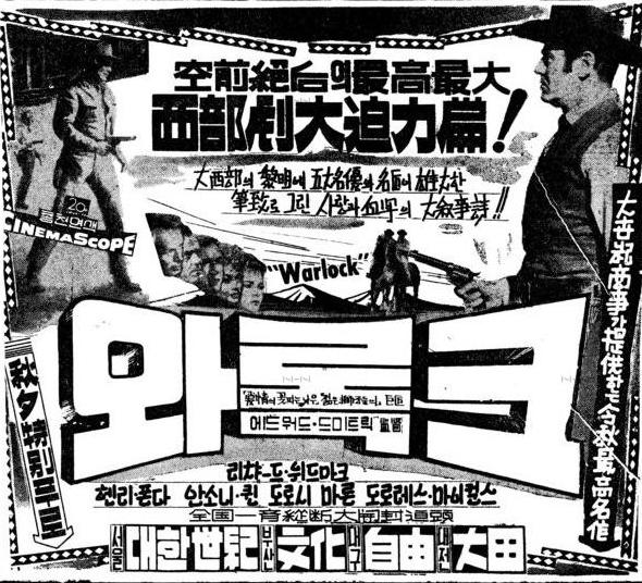 1959년작, "워록"의 신문 광고